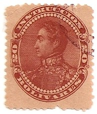 Estampilla fisco-postal de Efigie de Simón Bolívar (escuela) del año 1893 impresas por American Bank Note Company, New York. Perforación 12 Nª de catálogo * según Aurelio Blanco: 72 Blanco, Aurelio. 2009: Venezuela Catálogo especializado de estampillas. Caracas. 183p. ISBN 980-300-176-0